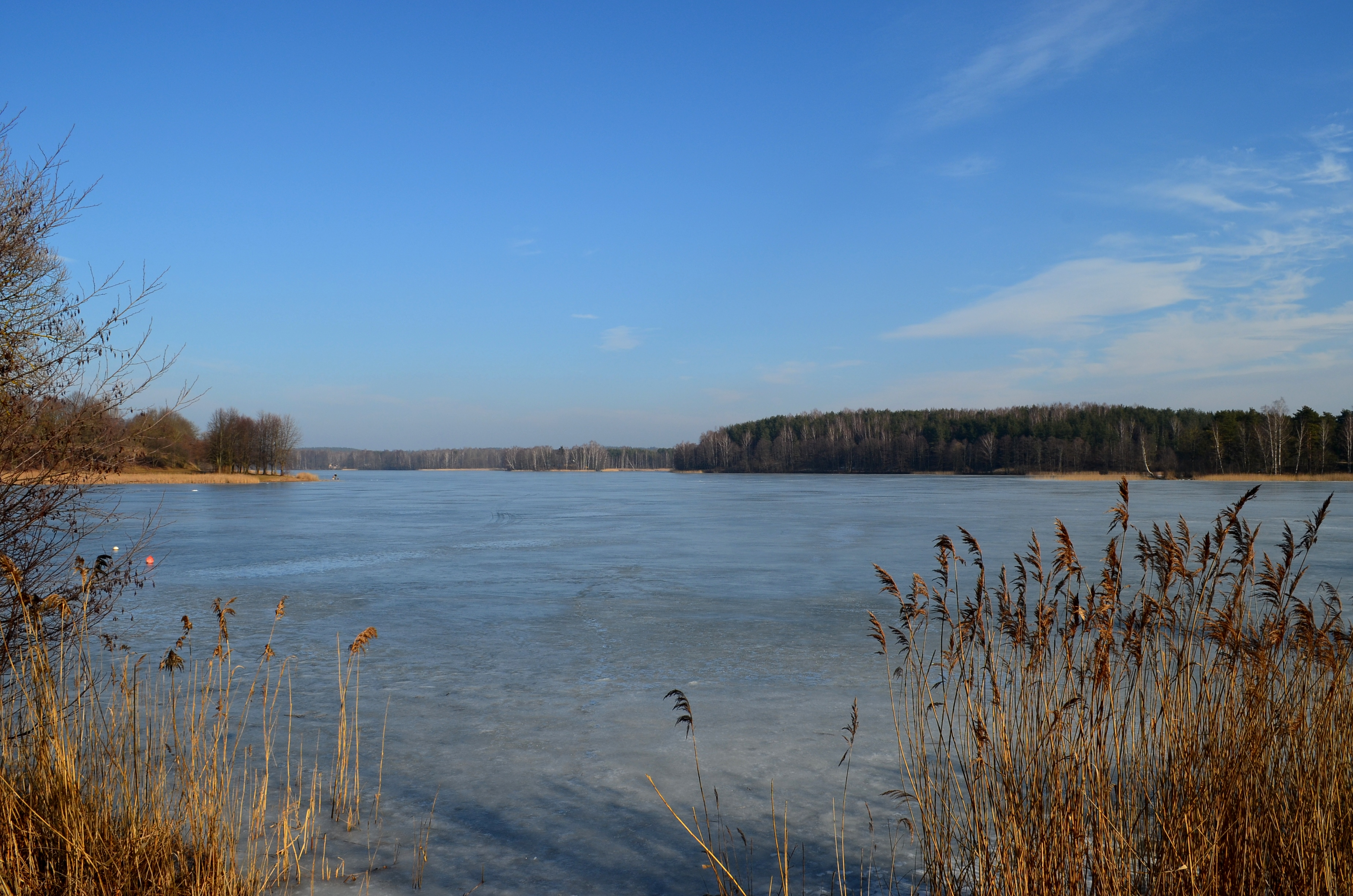 Lukos ežeras, Trakai